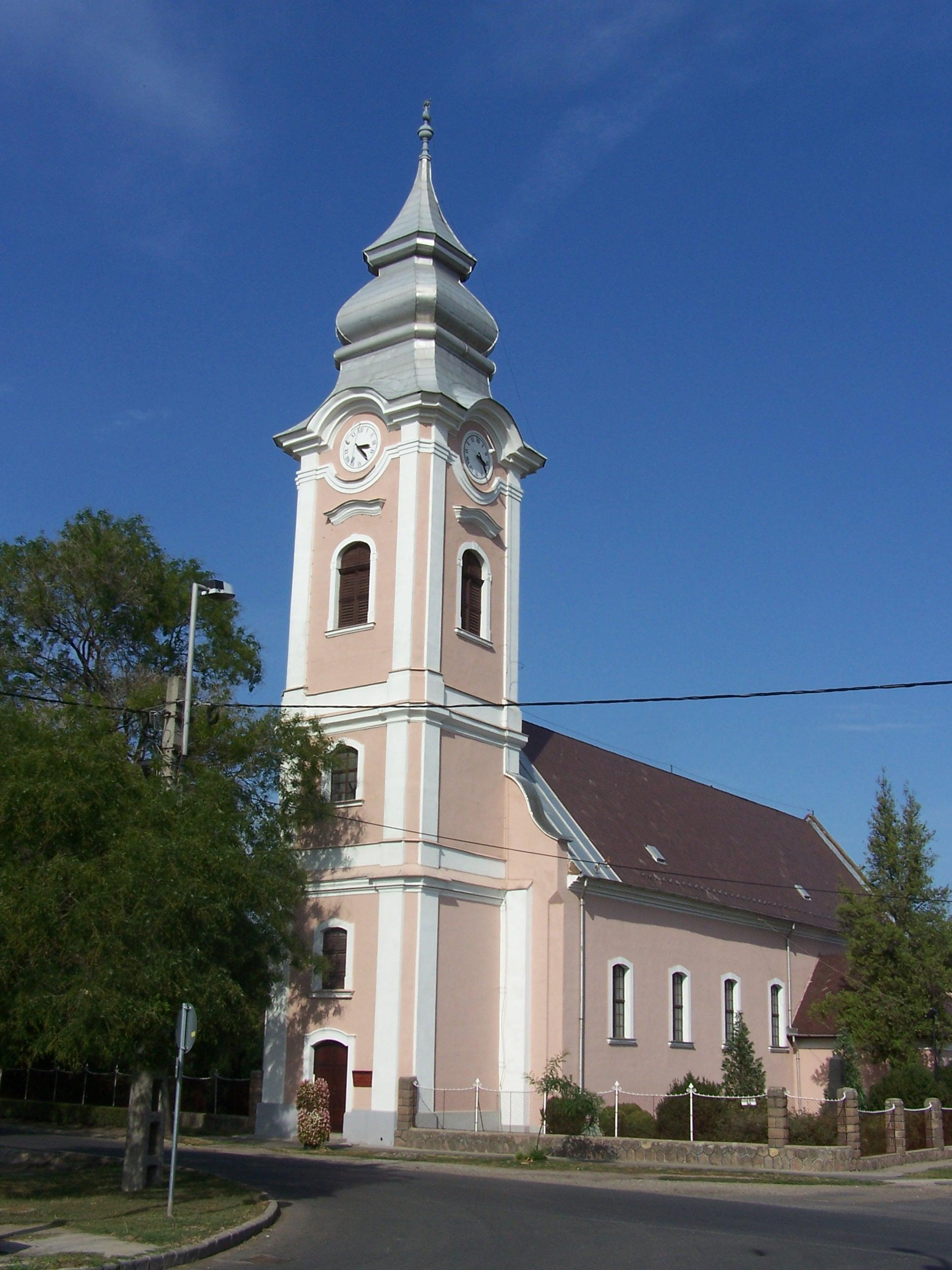 Református templom (Mezőkeresztes, Dózsa Gy. u.) This is a photo of a monument in Hungary. Identifier: 2896